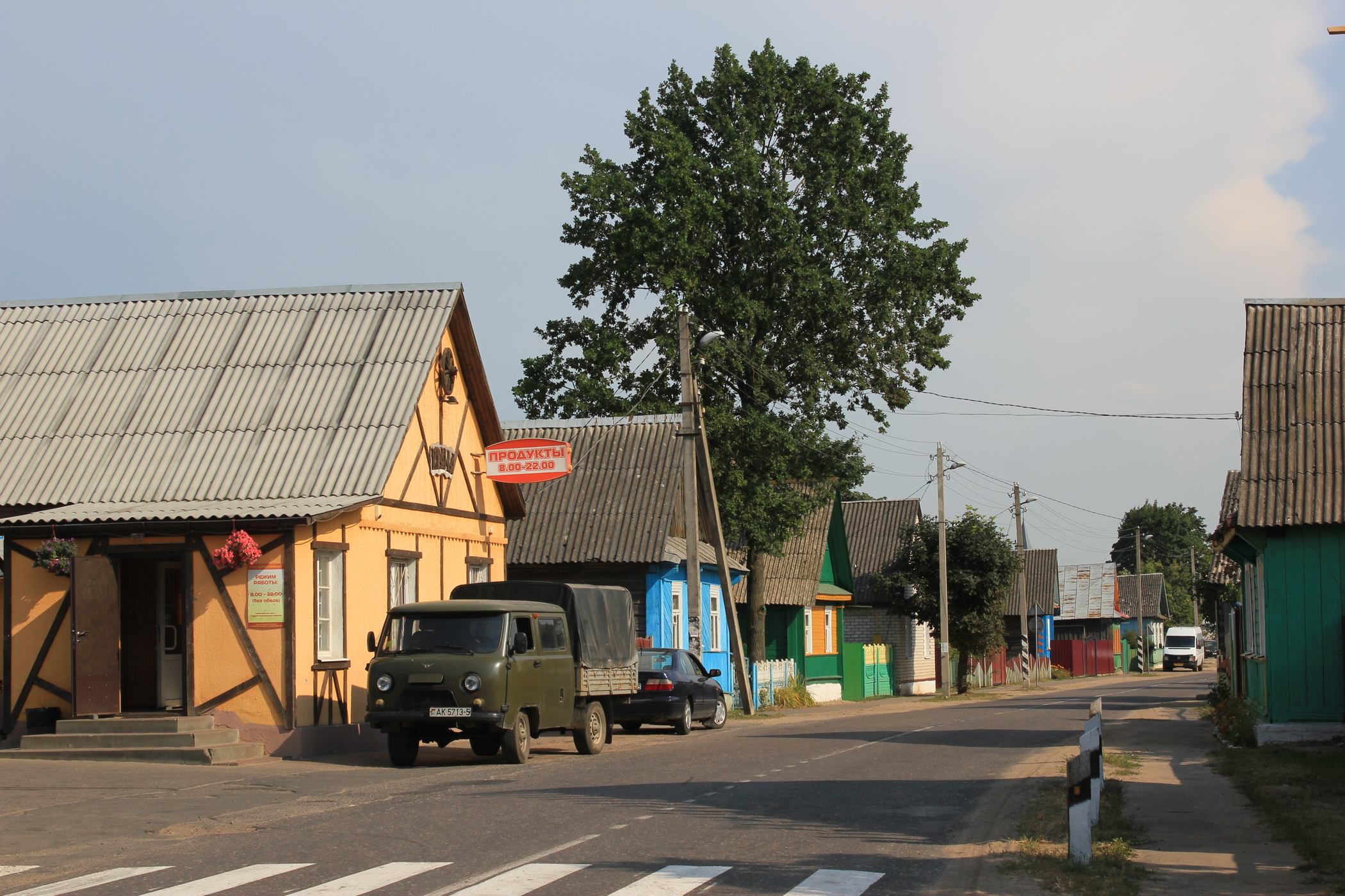 Straßenszene in Rakau, Belarus